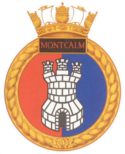 Blason du HMCS Montcalm